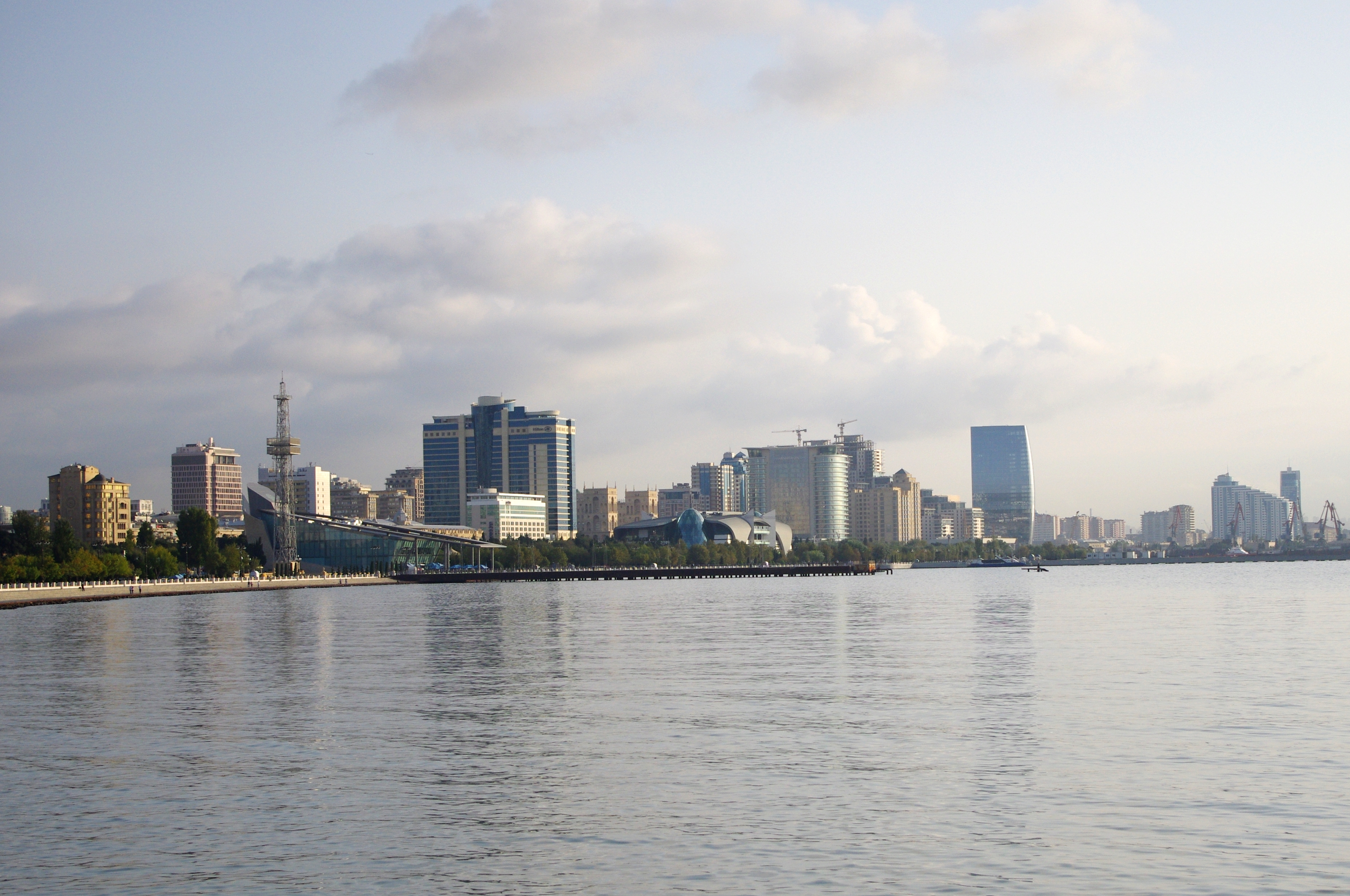 Вид на бульвар. Утро